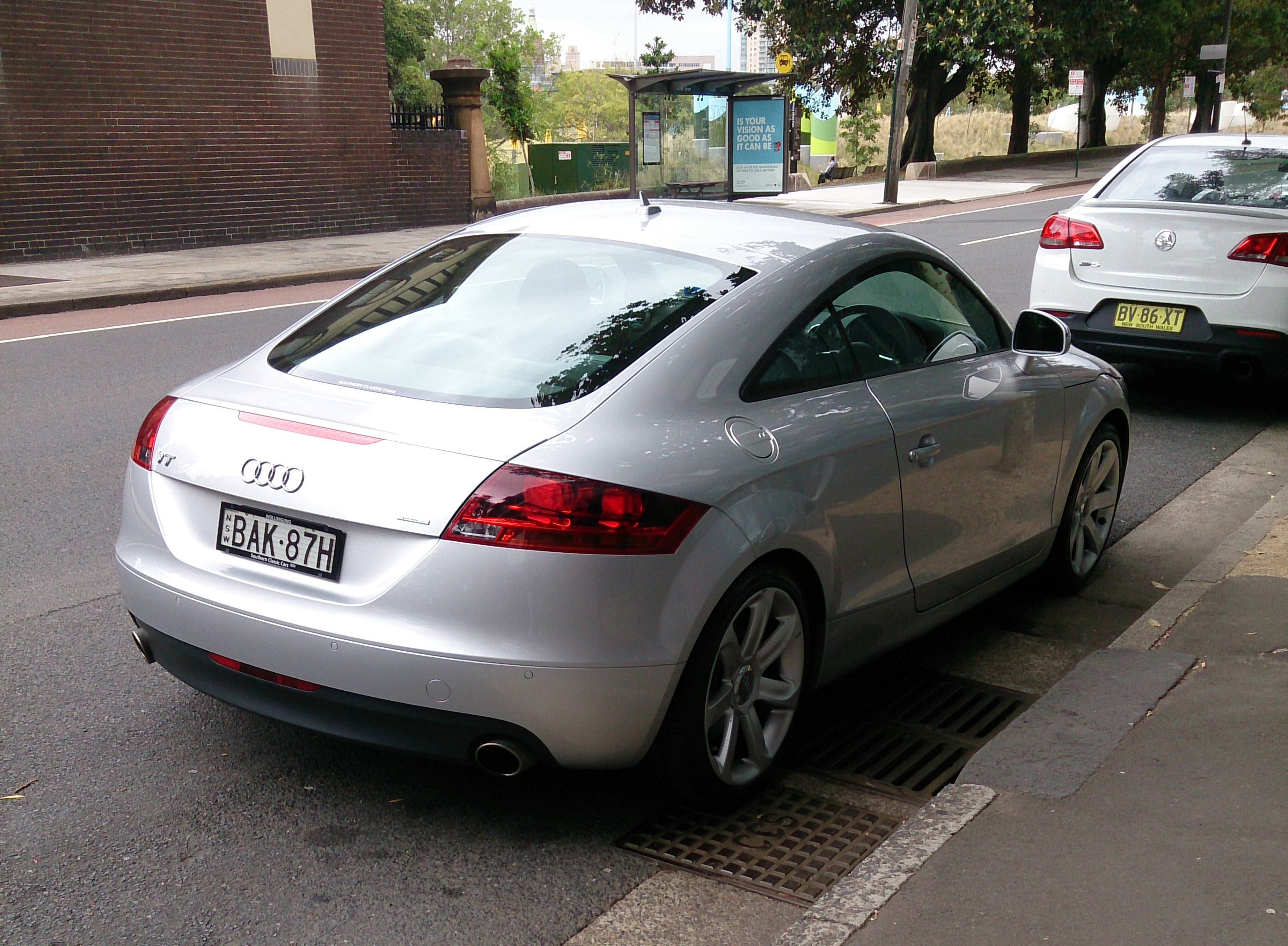 Audi TT